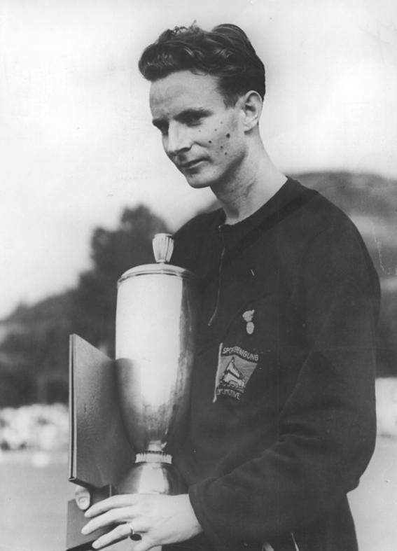 Klaus Richtzenhain Zentralbild Wlocka-Wittig Deutsche Leichtathletik-Meisterschaften 1958 in Jena 18. - 20.Juli UBz: Klaus Richtzenhain, der die 1500 m-Strecke in Weltjahresbestzeit (3:42,6 Min) lief, bei der Siegerehrung.